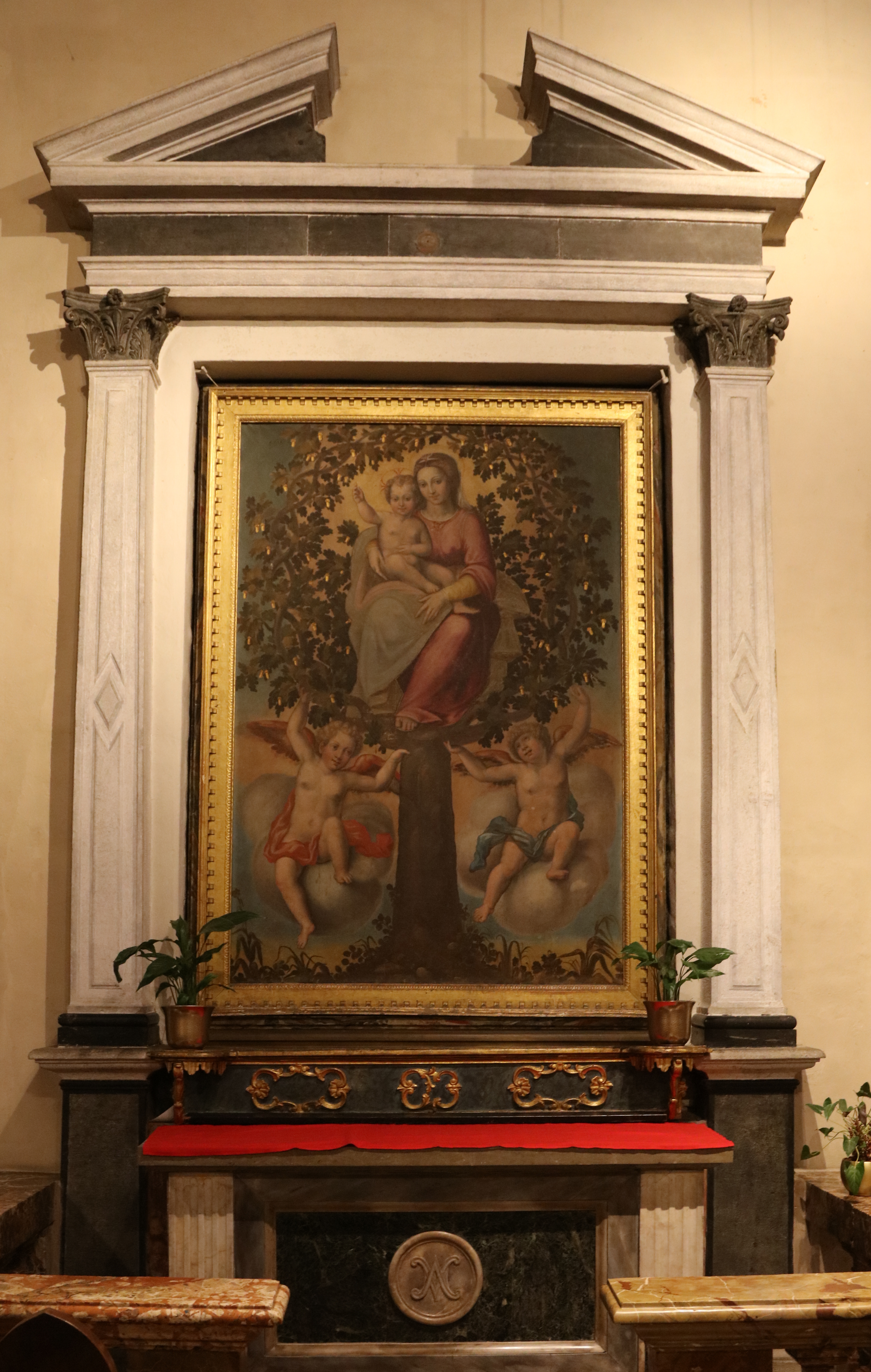 Der Altar der Muttergottes im Eichenbaum an der Nordwand des Schiffes der Santa Maria della Misericordia